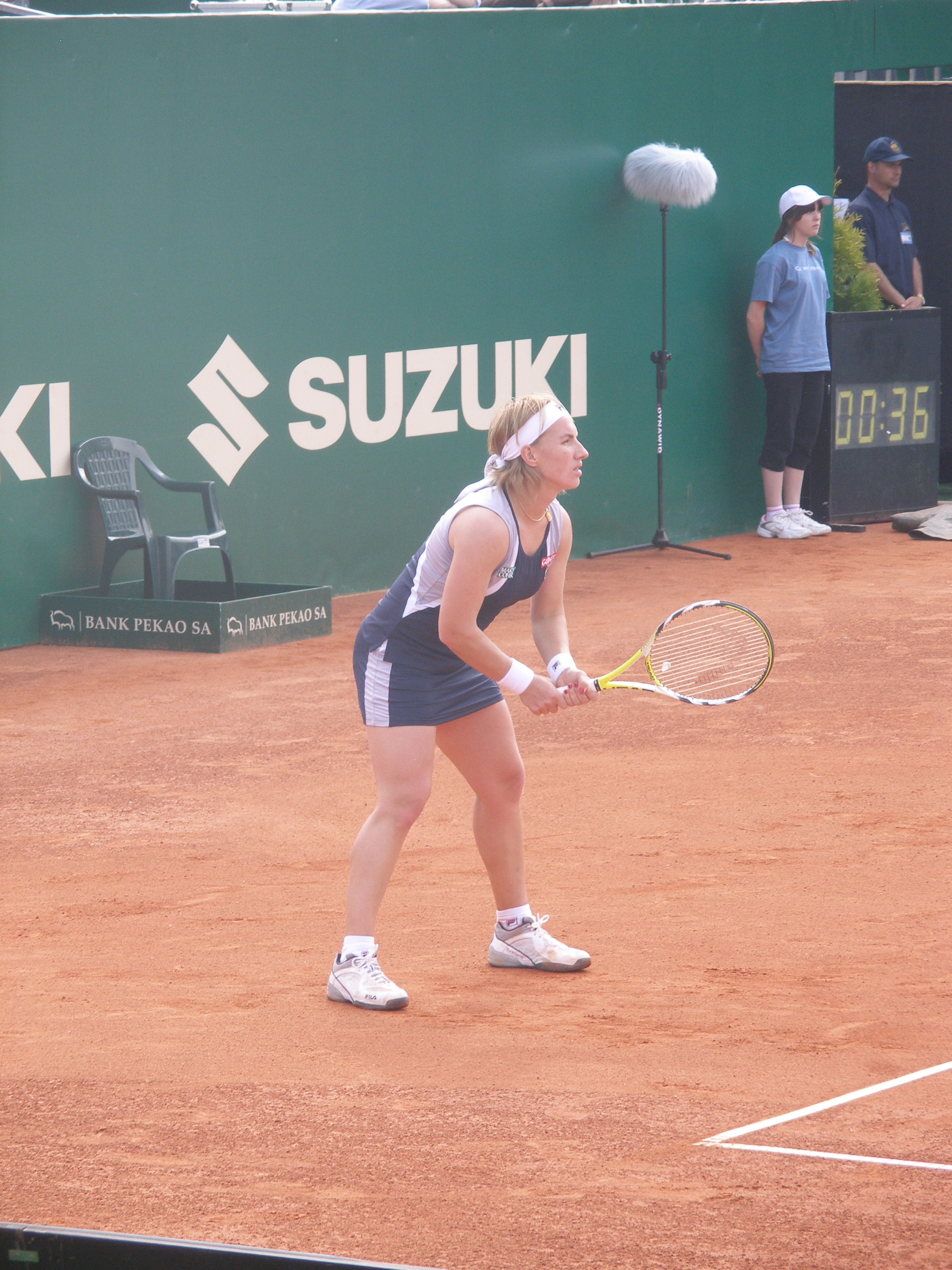 Swietłana Kuzniecowa podczas meczu z Marią Kirilenko, Suzuki Warsaw Masters 2008